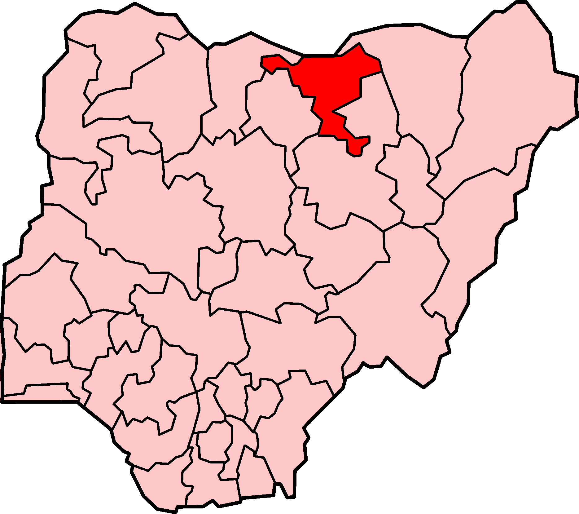 Localização do estado de Jigawa.